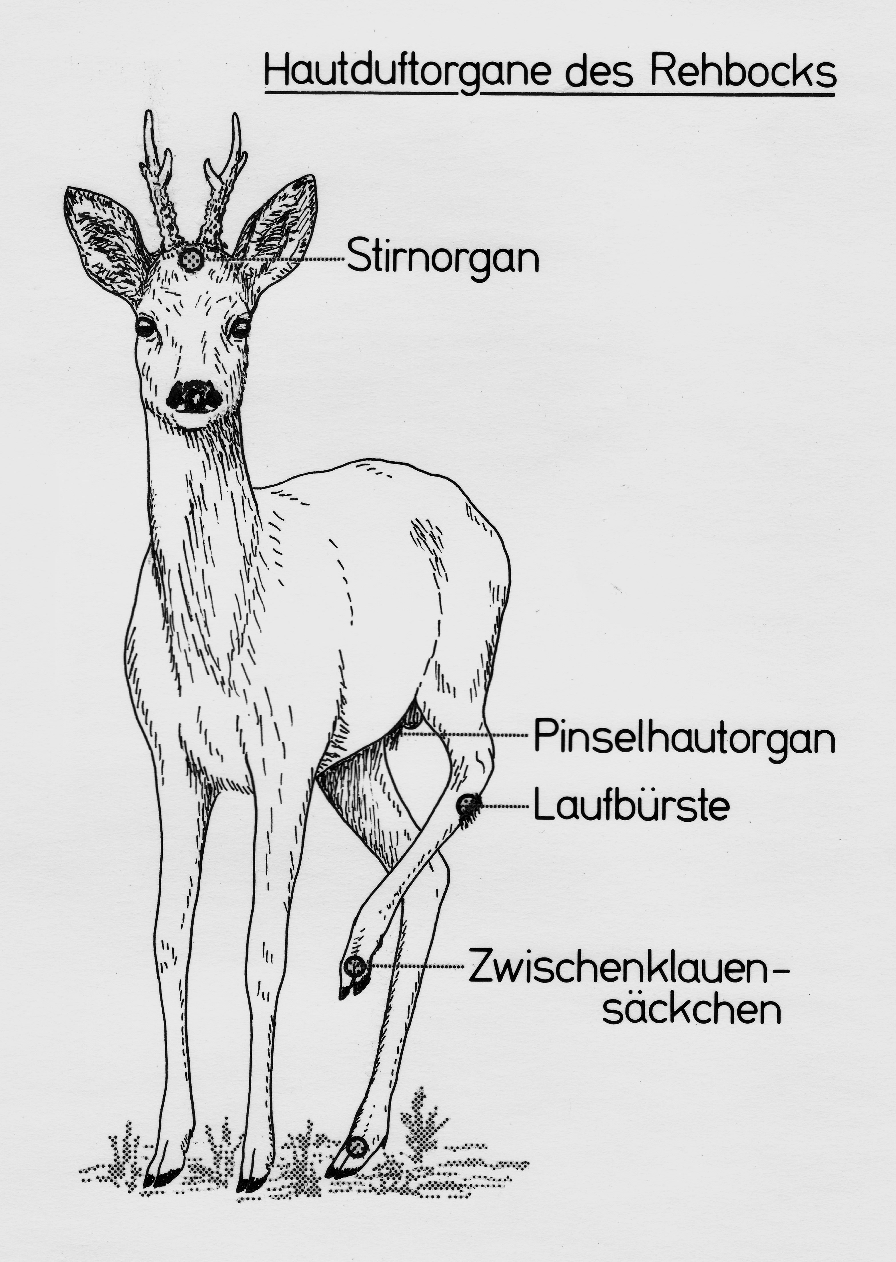 Der Reviermarkierung dienende Hautduftorgane des Rehbockes